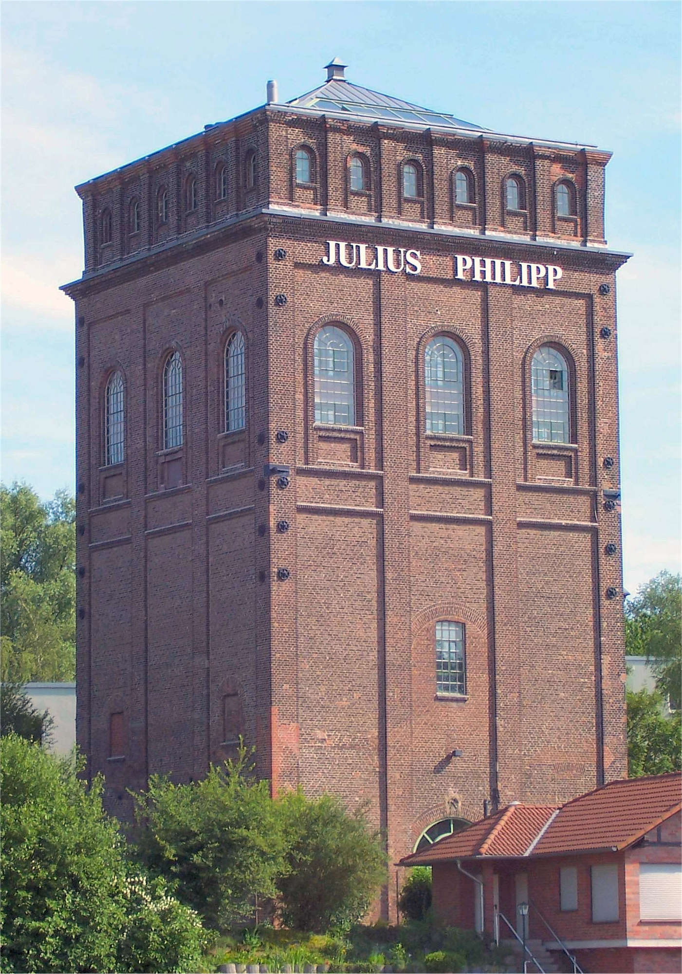 Malokow-Turm der Zeche Julius-Philipp, Bochum